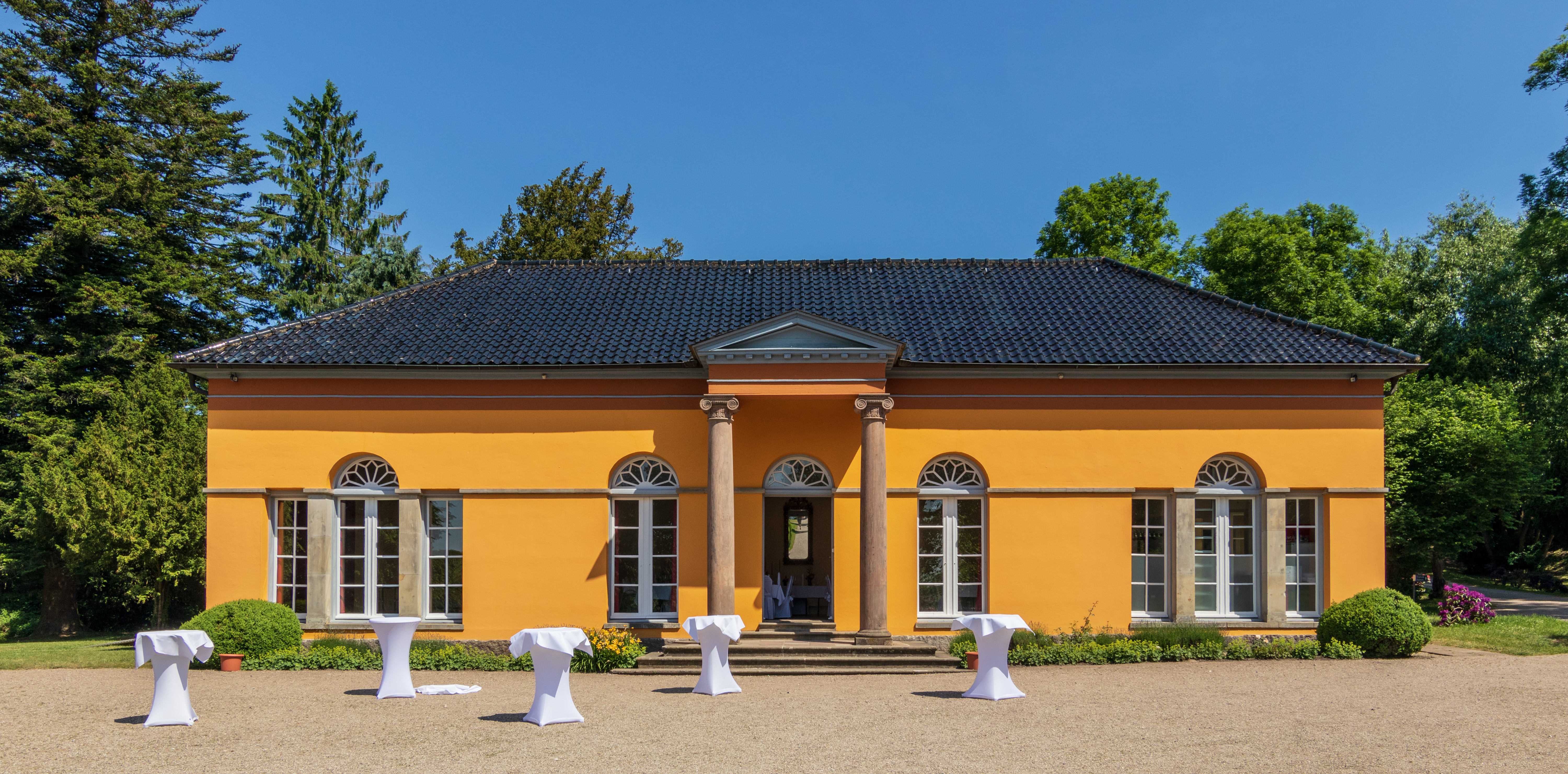 Glücksburg in Schleswig-Holstein. Die Orangerie gehört zum Schloss Glücksburg und steht unter Denkmalschutz.